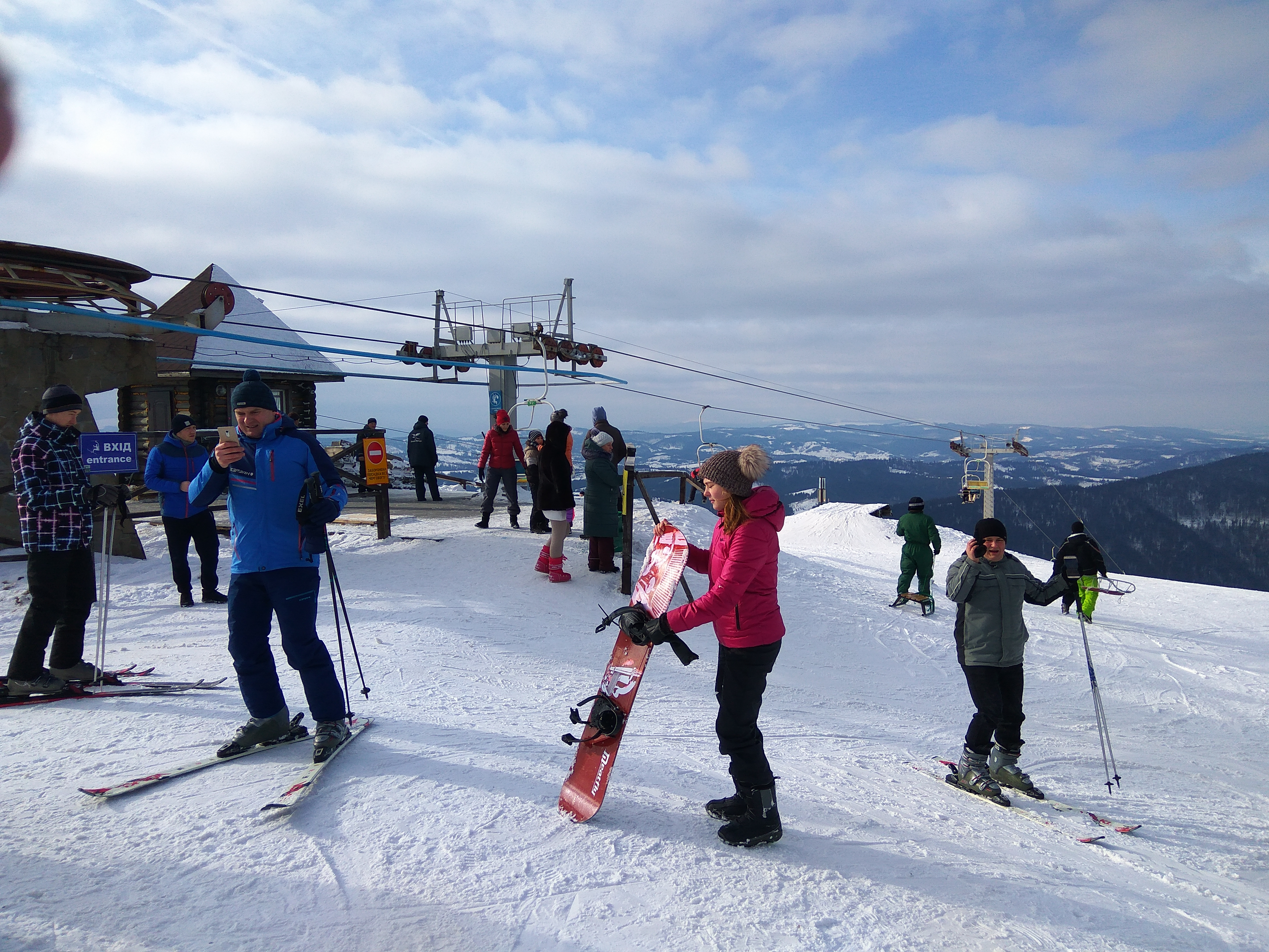 Гірськолижний курорт "Захар Беркут"